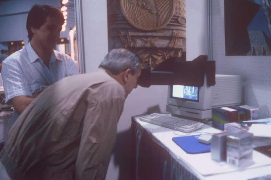 StereoFot al XVII convegno dell'ISPRS, svoltsi a Washington nei giorni 2-14 agosto 1992